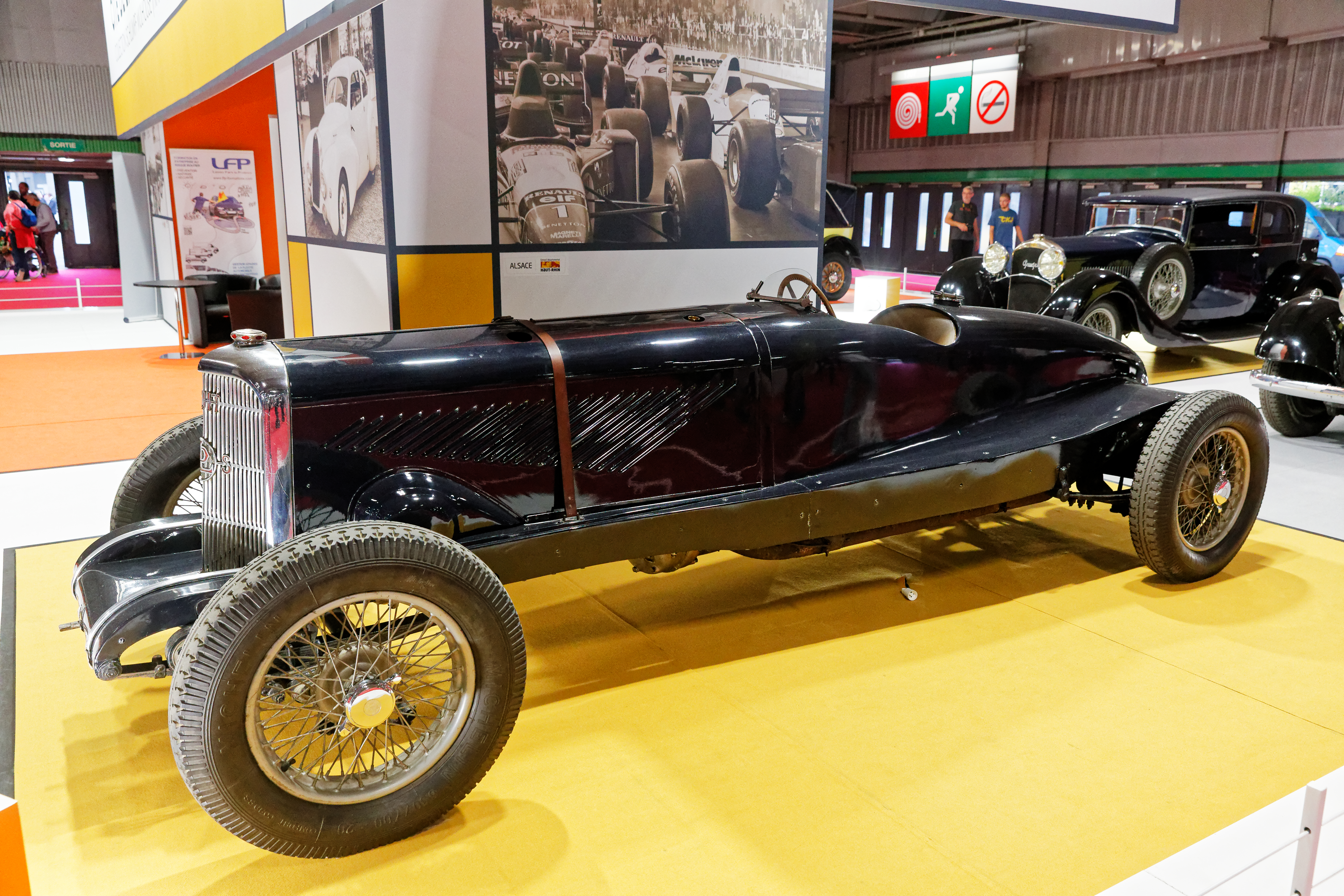 Une Panhard Levassor 35 CV exposée lors du mondial de l'automobile de Paris 2018.